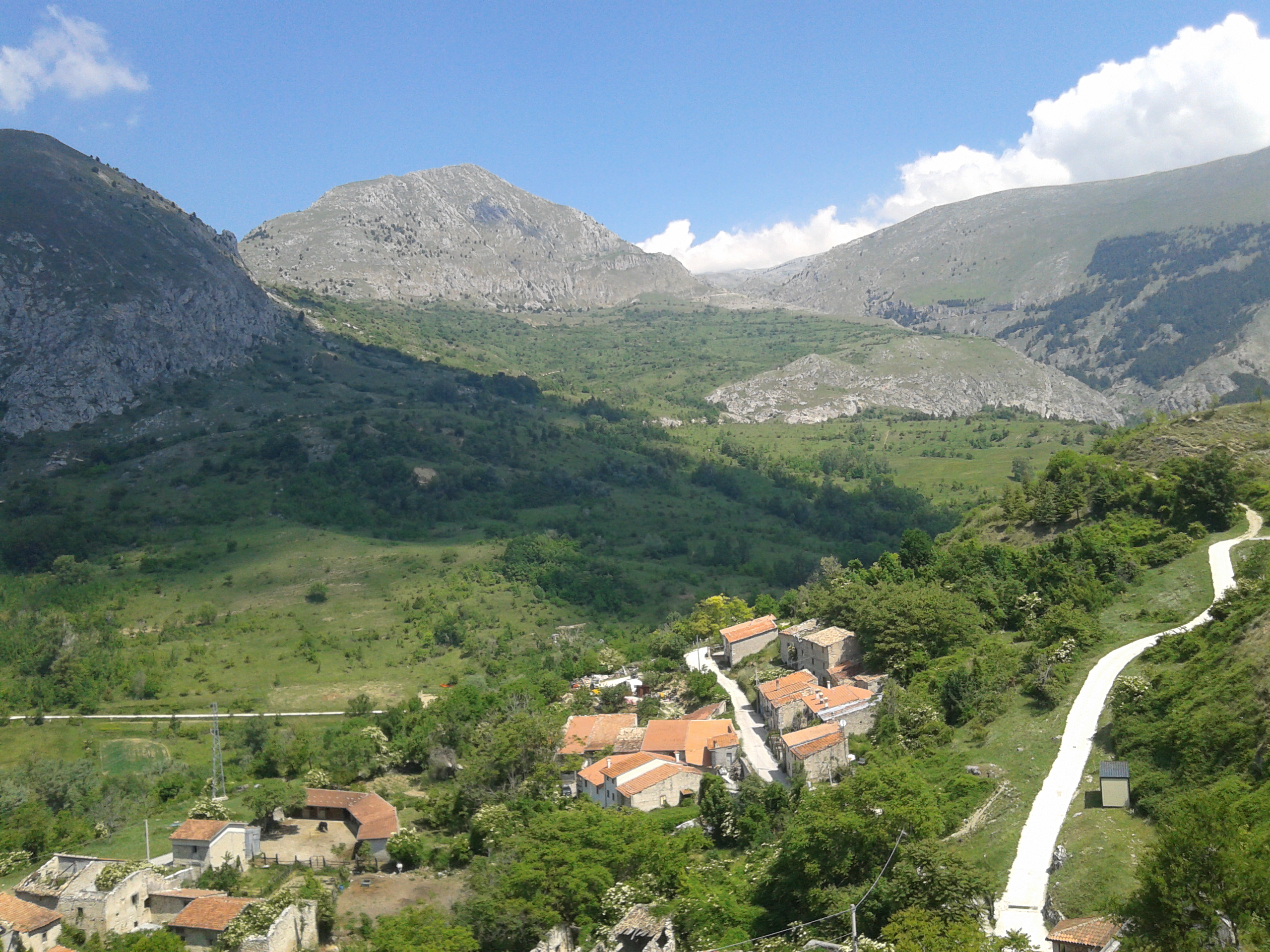 Monte Tino visto da Aielli Alto